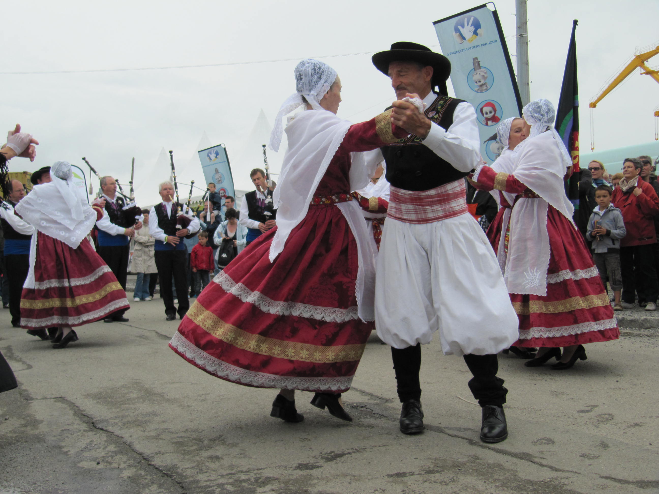 Bagad Adarre de Plougastel